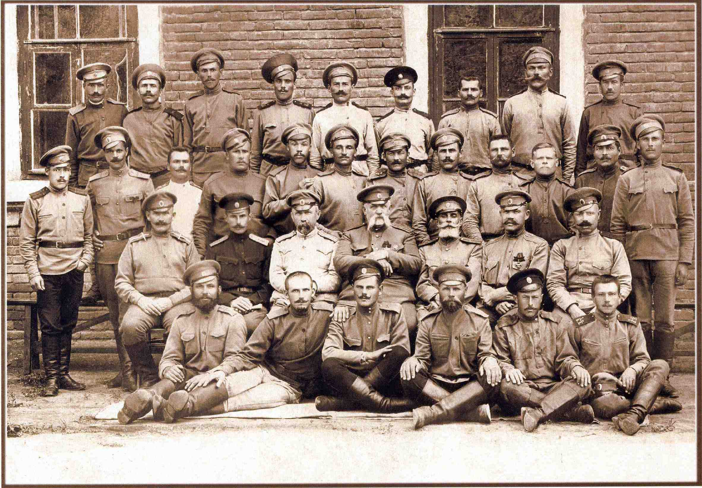 Файл наданий Затурцівським меморіальним музеєм В'ячеслава Липинського